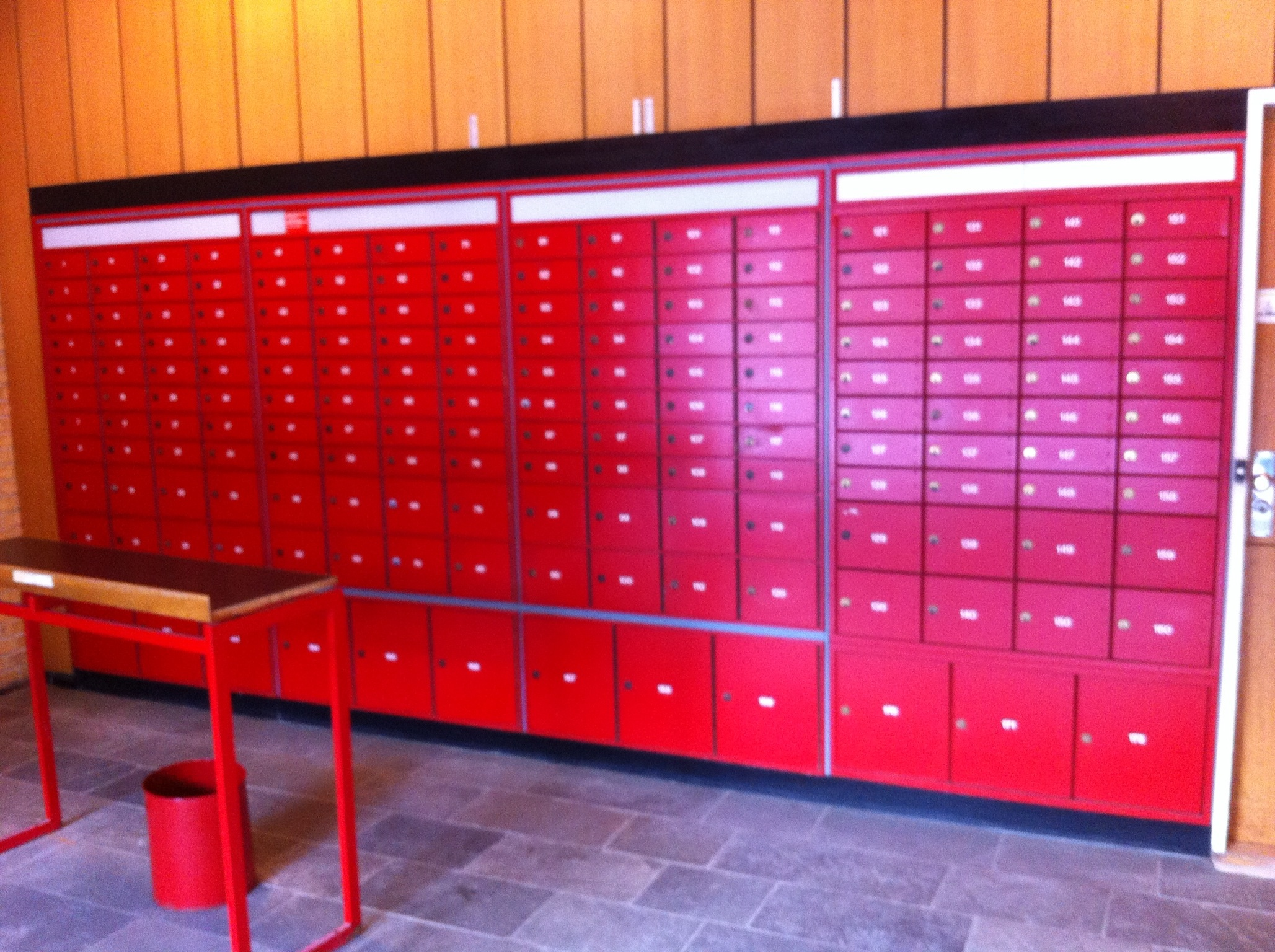 Postbokse på Hadsund Posthus, Himmerlandsgade 10, 9560 Hadsund